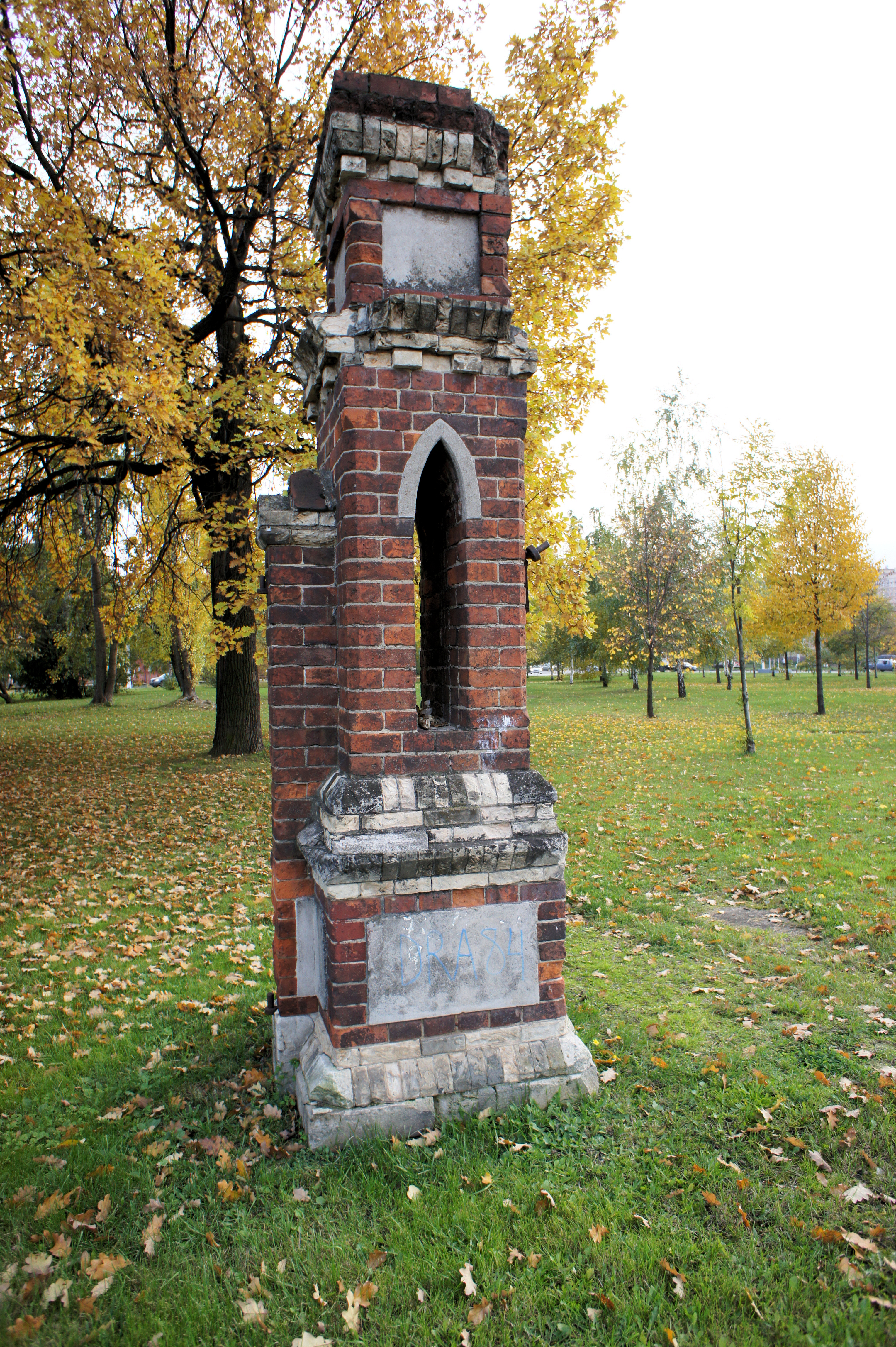 Устой кирпичных ворот конца XIX — начала XX веков дачной усадьбы купца Г. С. Ерохова в Царицыно.